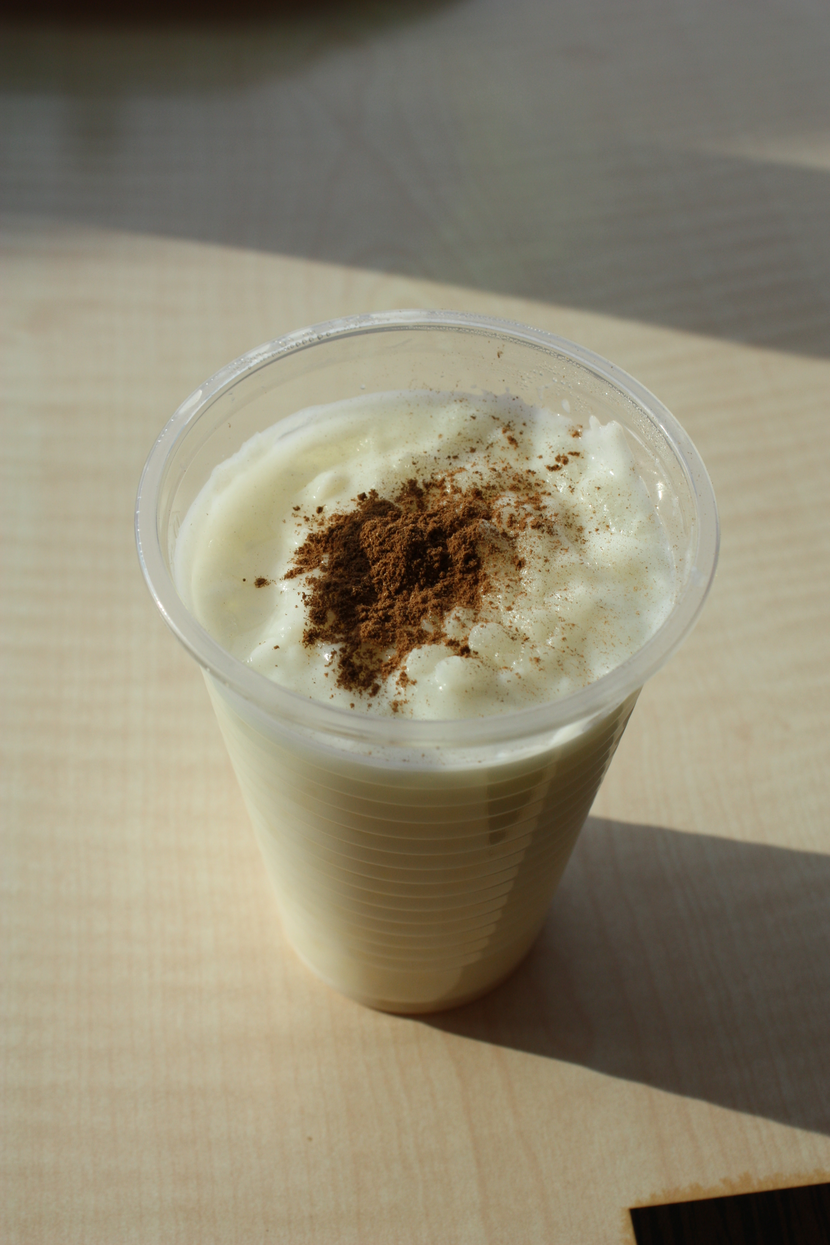 Cuisine of Bulgaria, Sofia, Bulgaria